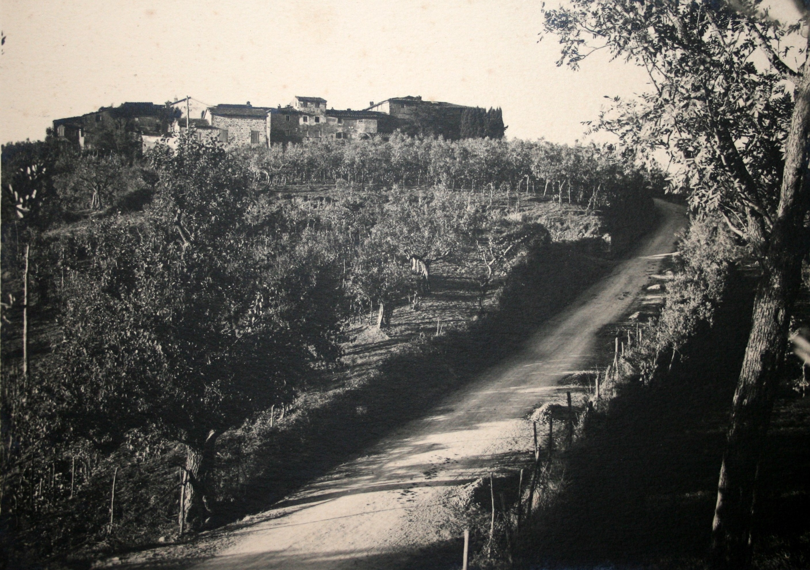 Moncioni panorama